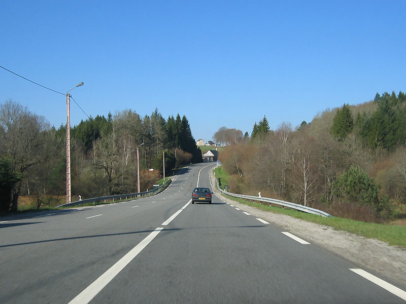 Route Nationale 89 - entre Ussel et Tulle - Limousin Personal picture